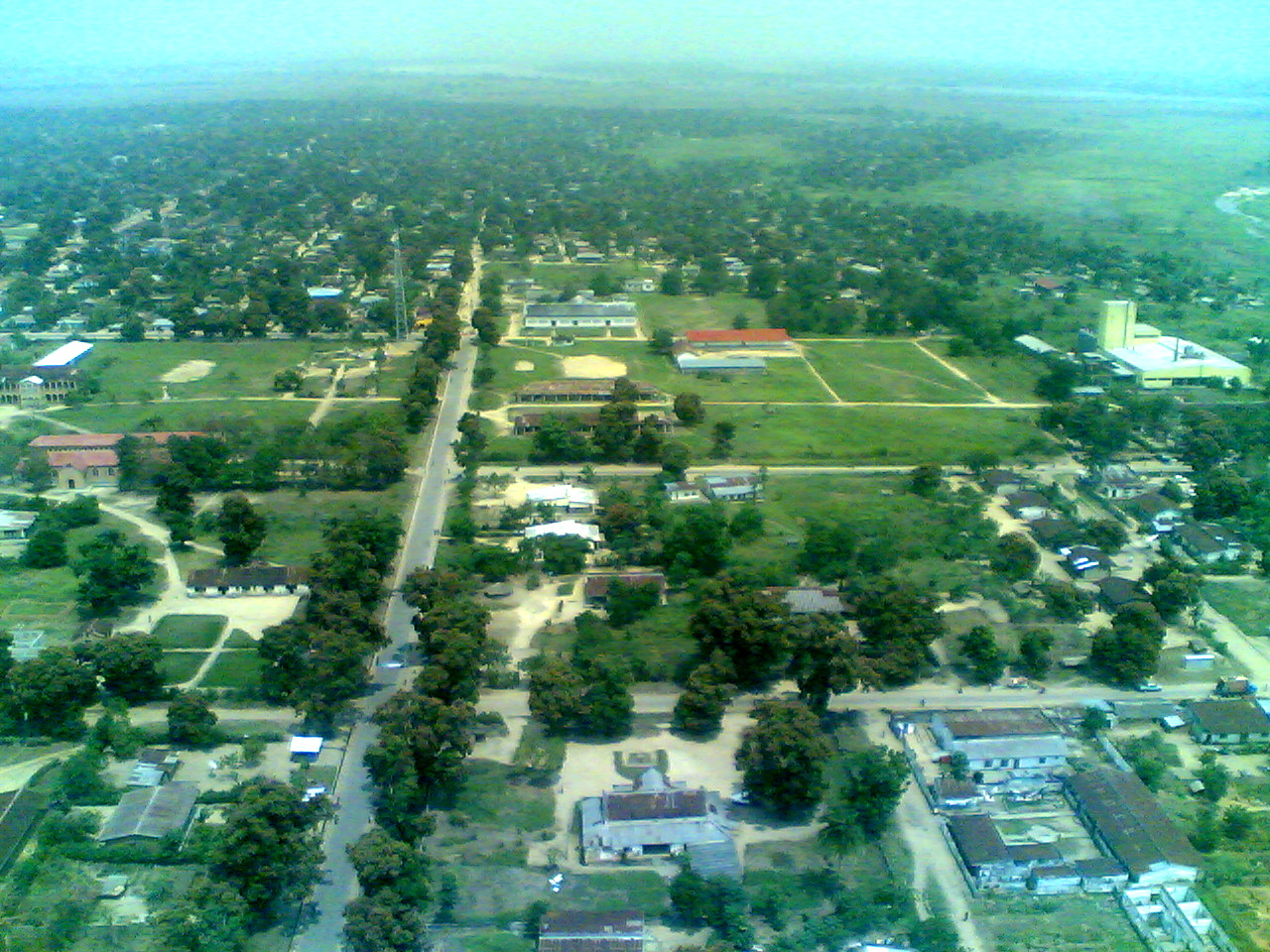 Vue aérienne du centre de Bandundu